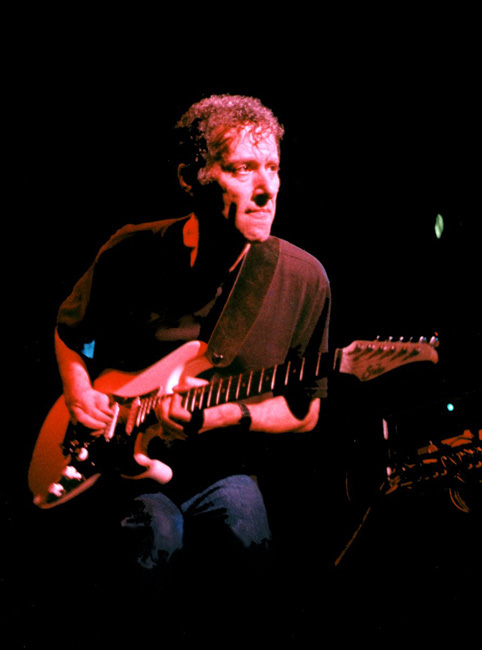 da